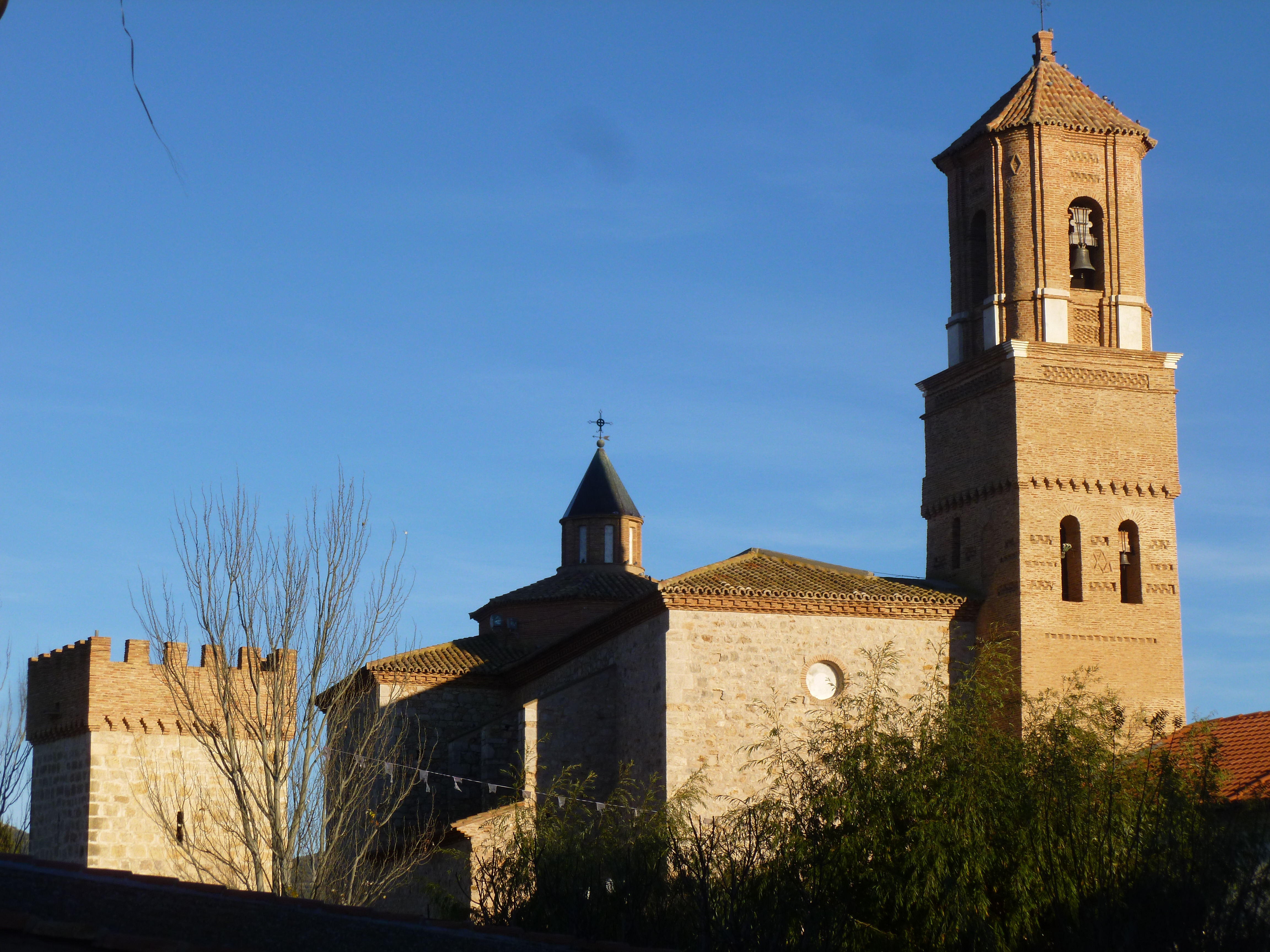 Iglesia de San Miguel Arcángel